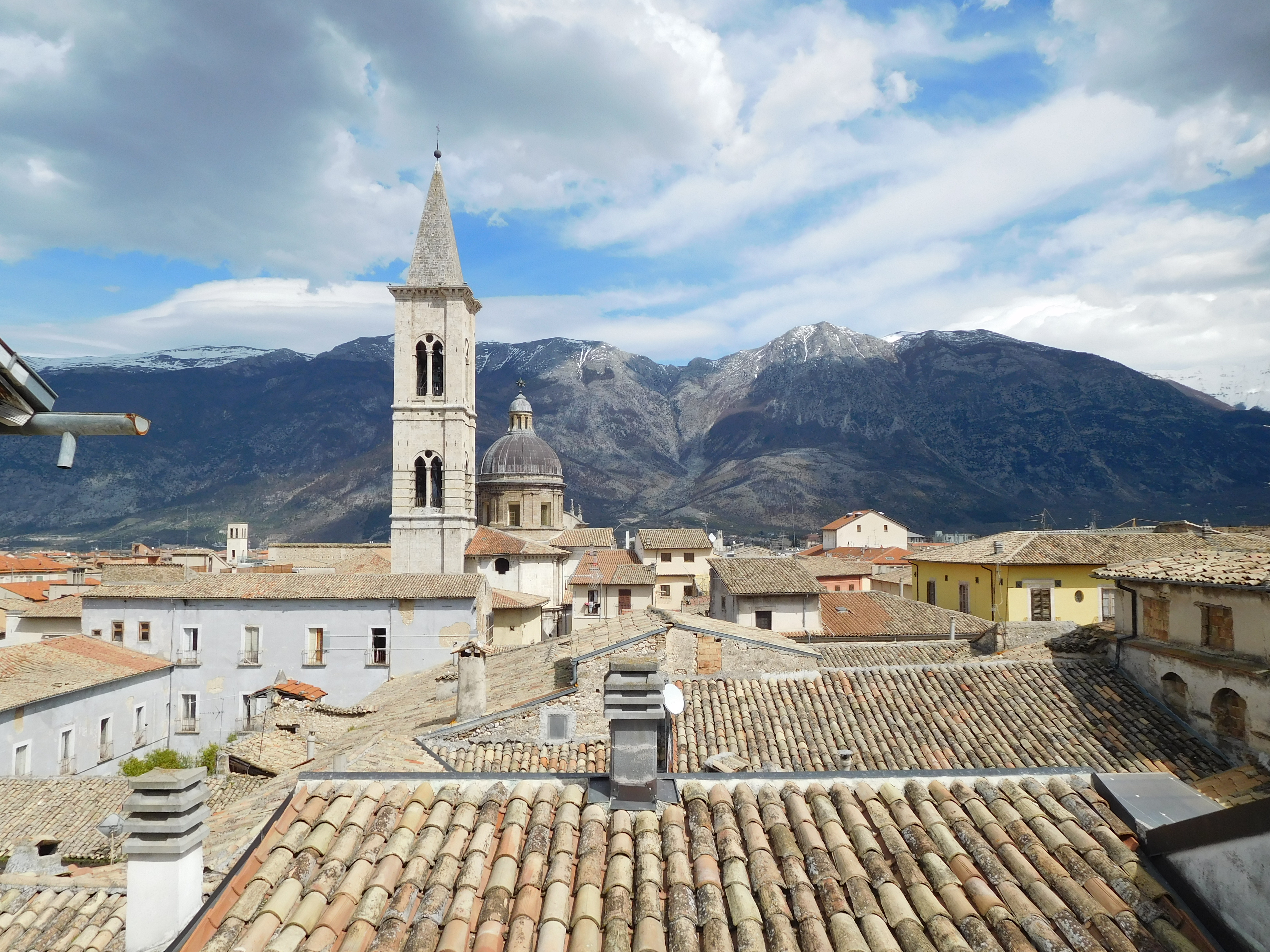 Sulmona vista dai tetti